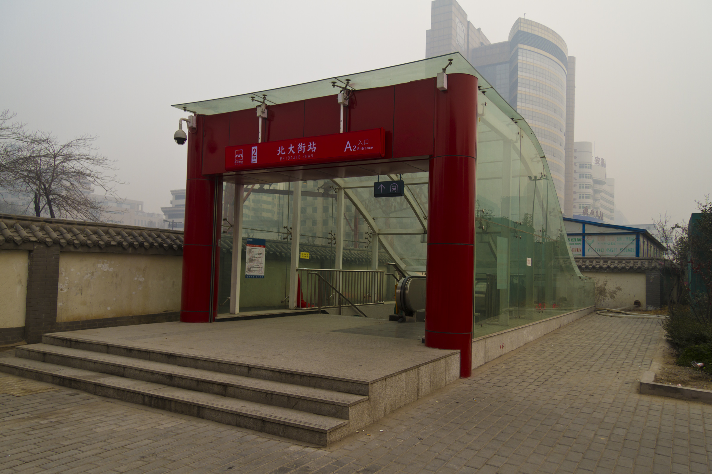 西安地铁2号线北大街站入口